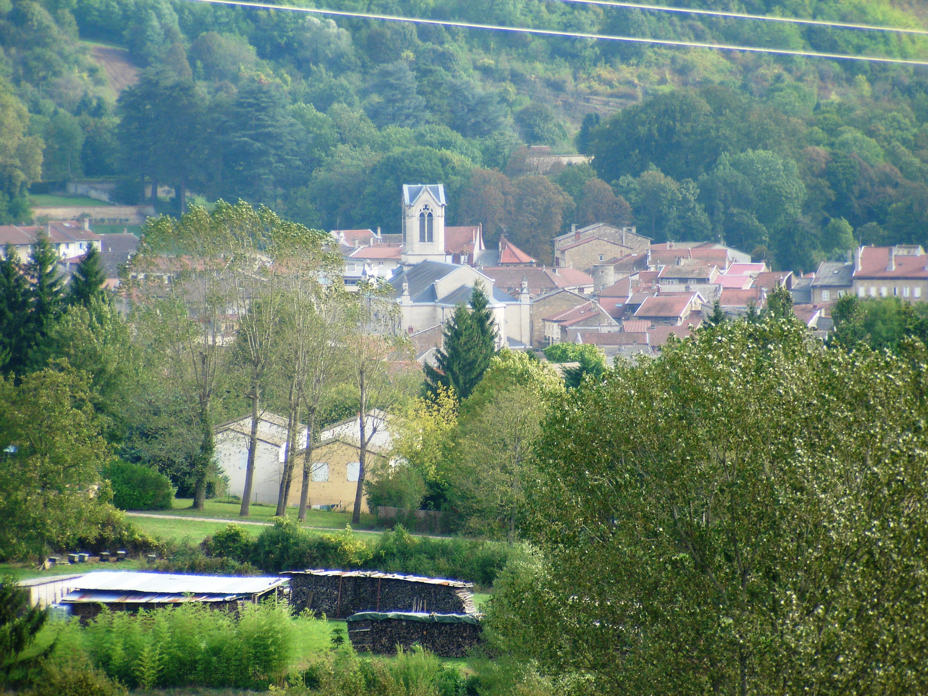 Vue du centre de LAGNIEU (01150-FRANCE)